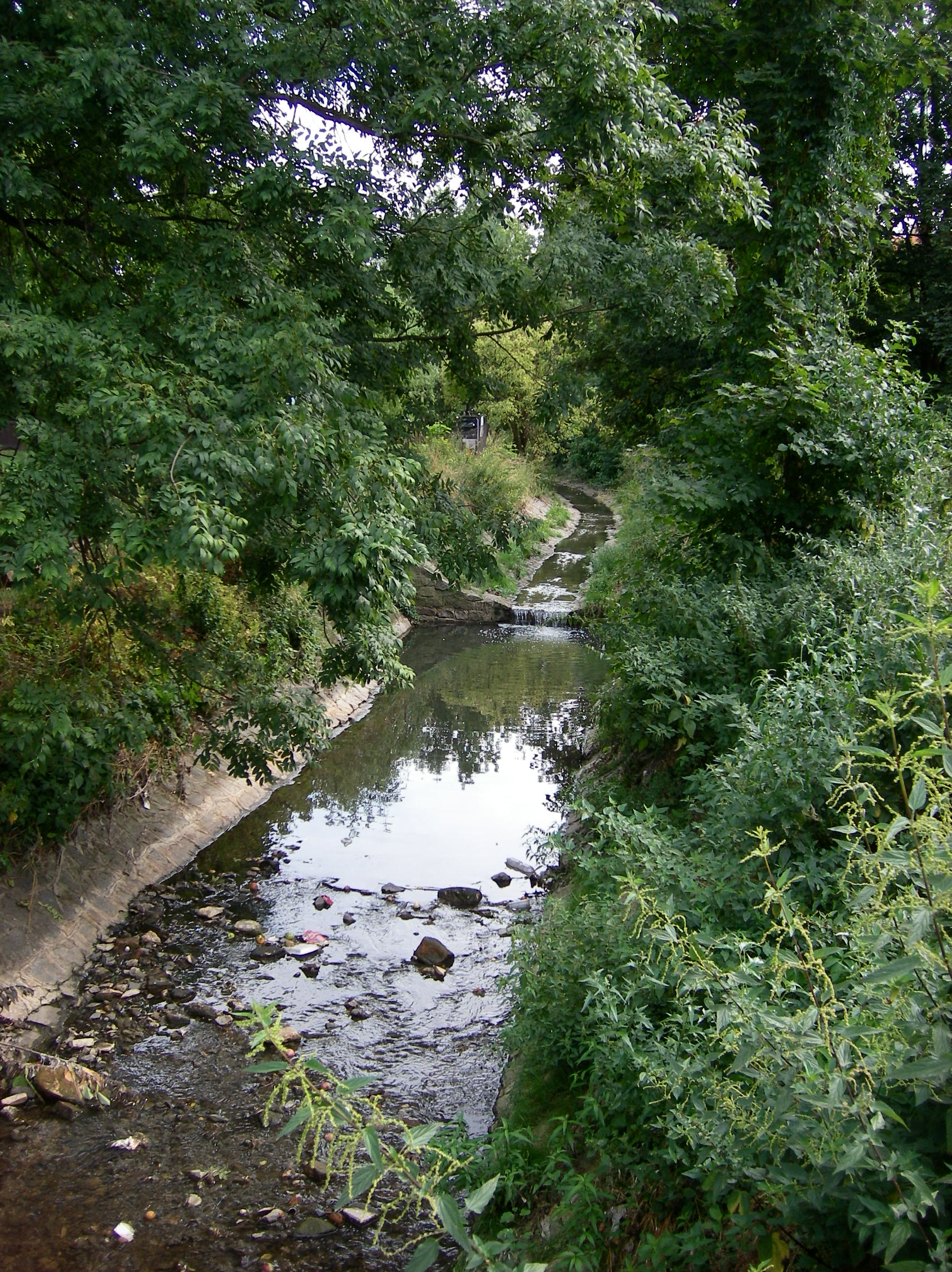 potok